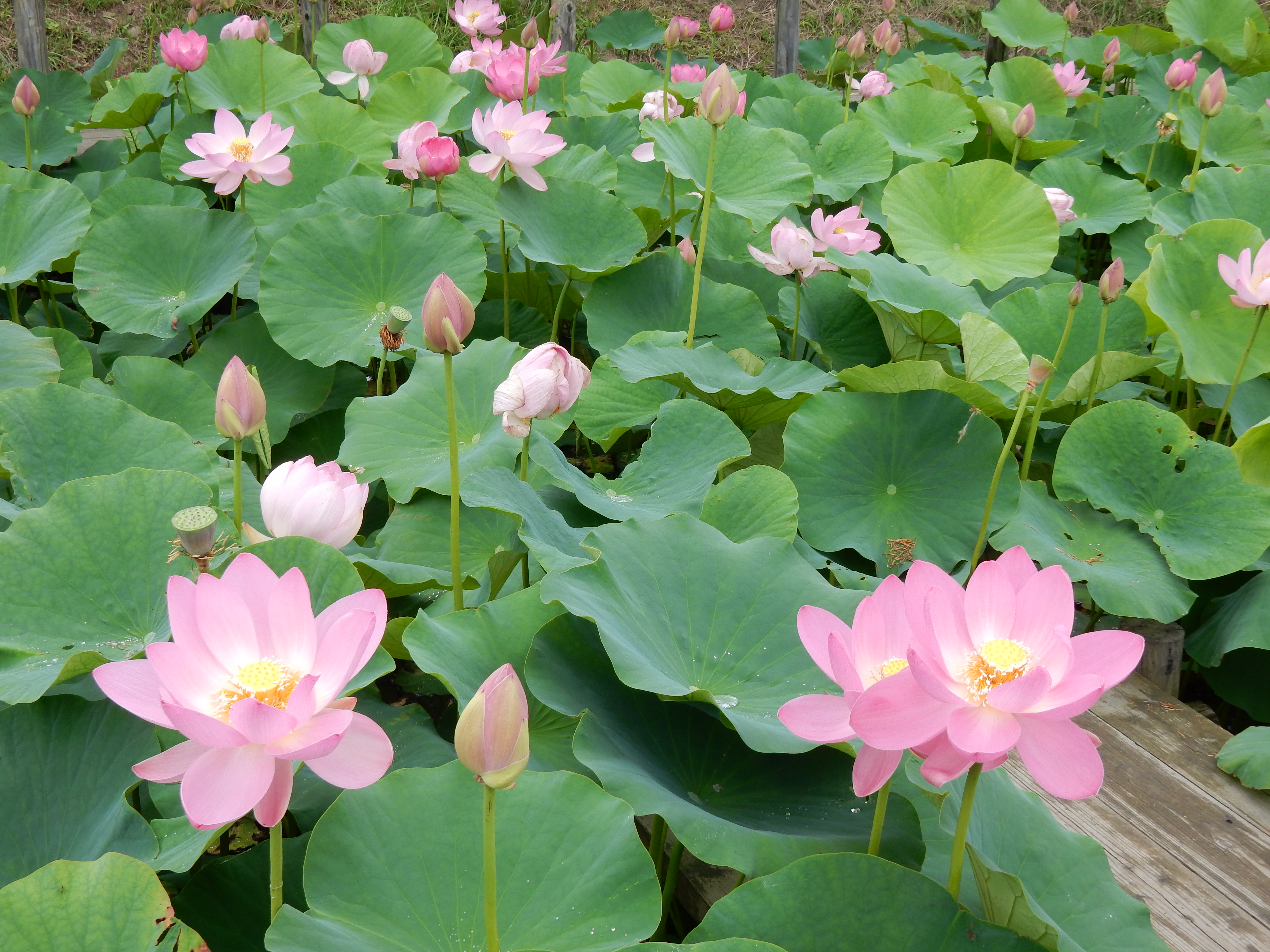 通称「古代蓮」奥州藤原氏四代藤原泰衡の首桶から見つかった蓮の種から開花 2016年7月21日撮影